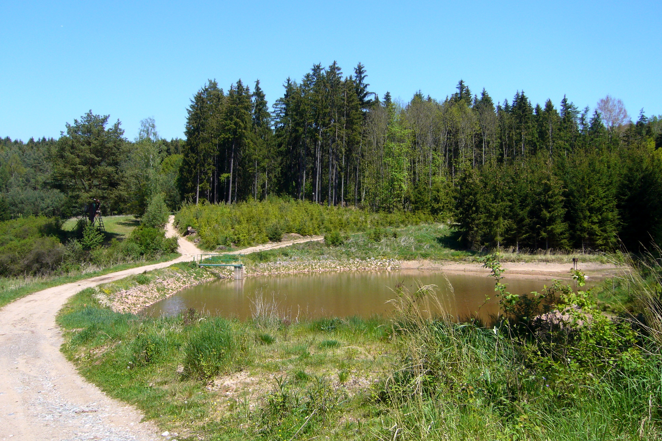 Celkový pohled na lokalitu (tvrziště nad rybníkem), Tvrziště Šebíkov, Trojany (Kralovice).